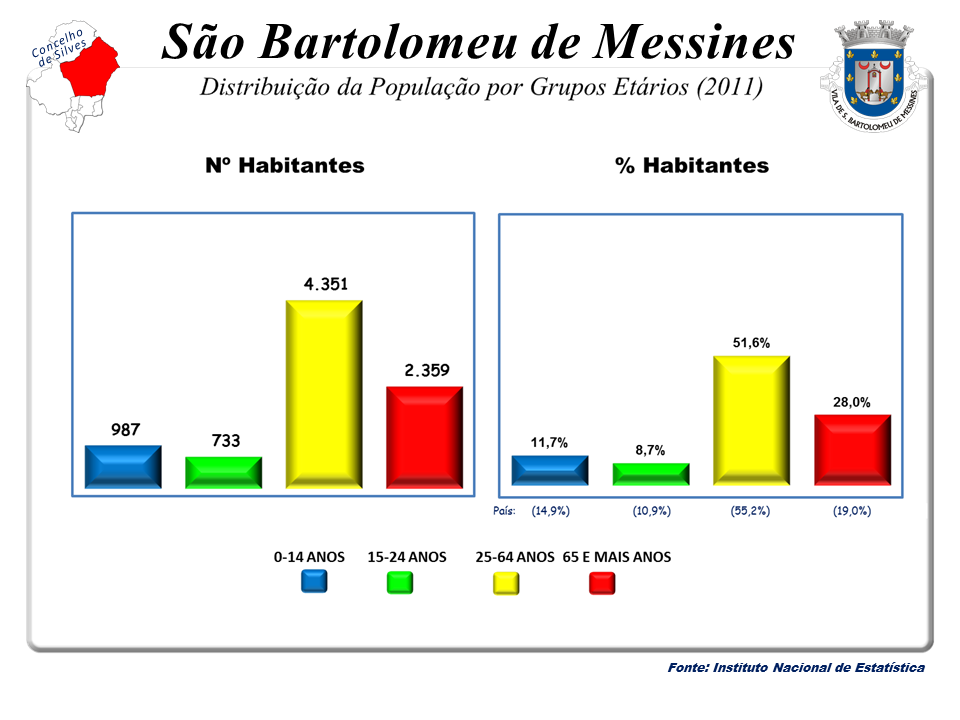 Censos 1864/2011